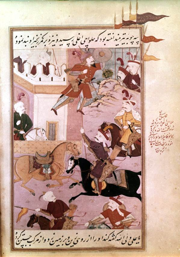 Muin Müsəvvirin “Tarix-i aləmaray-i Şah İsmayıl” əsərinə çəkdiyi miniatürlərdən